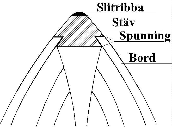 Konstruktionsdetaljer i träbåt Gjord på Designer 4.0